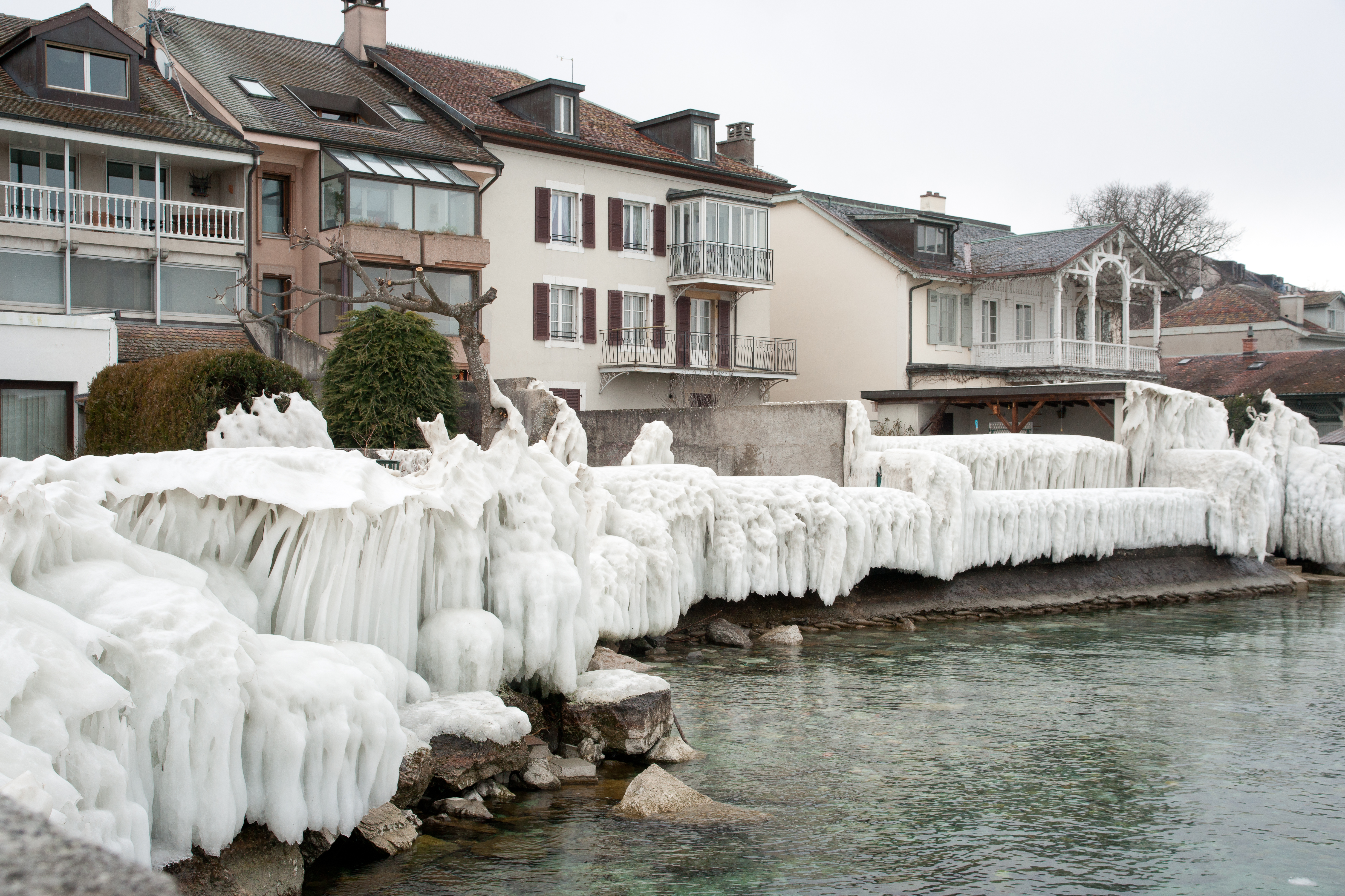 Versoix et les rives du Léman gelées en février 2012.